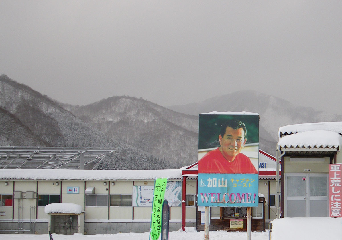 加山キャプテンコーストスキー場 駐車場から